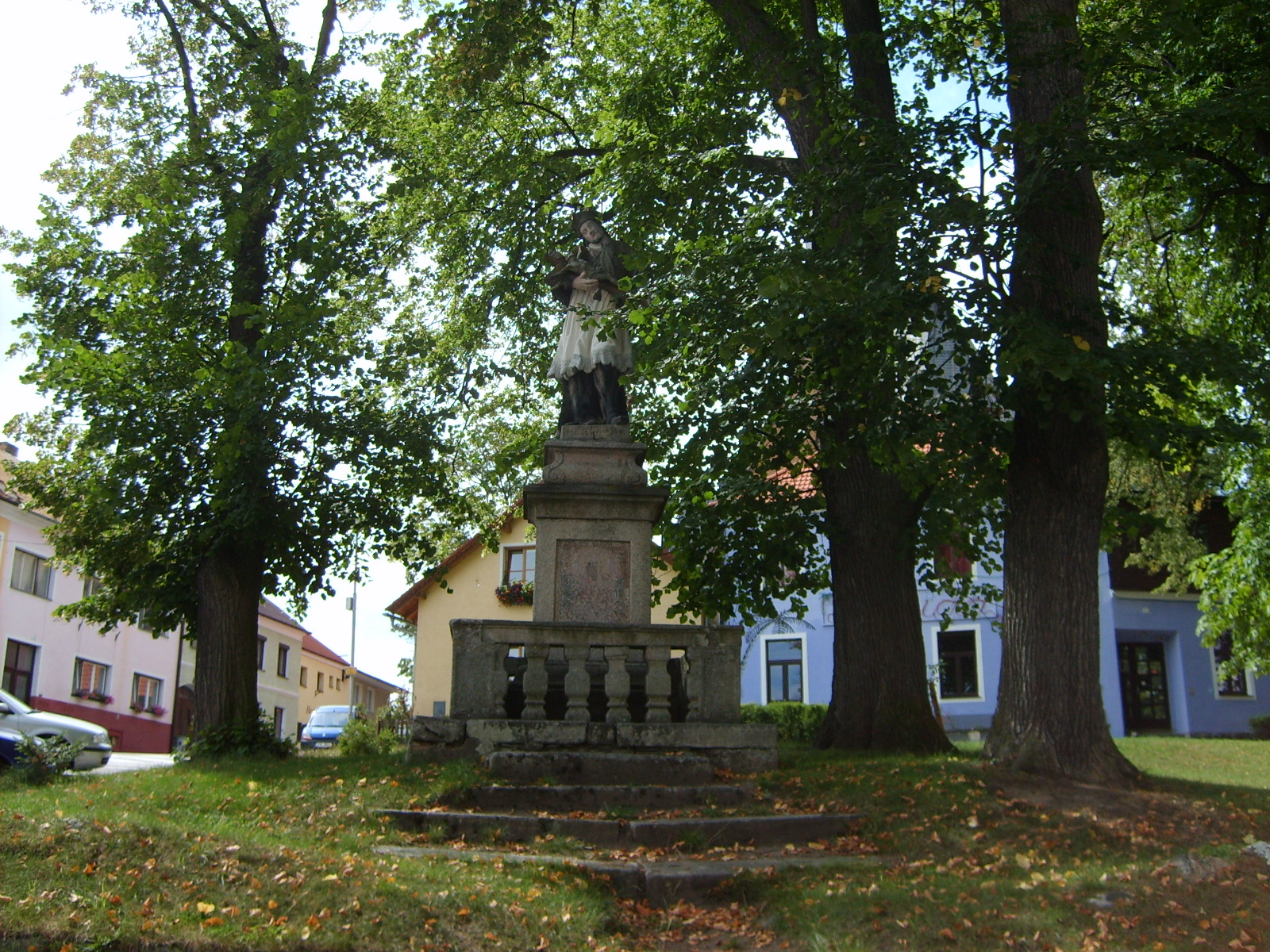 St. John of Nepomuk statue in Dolní Dvořiště.